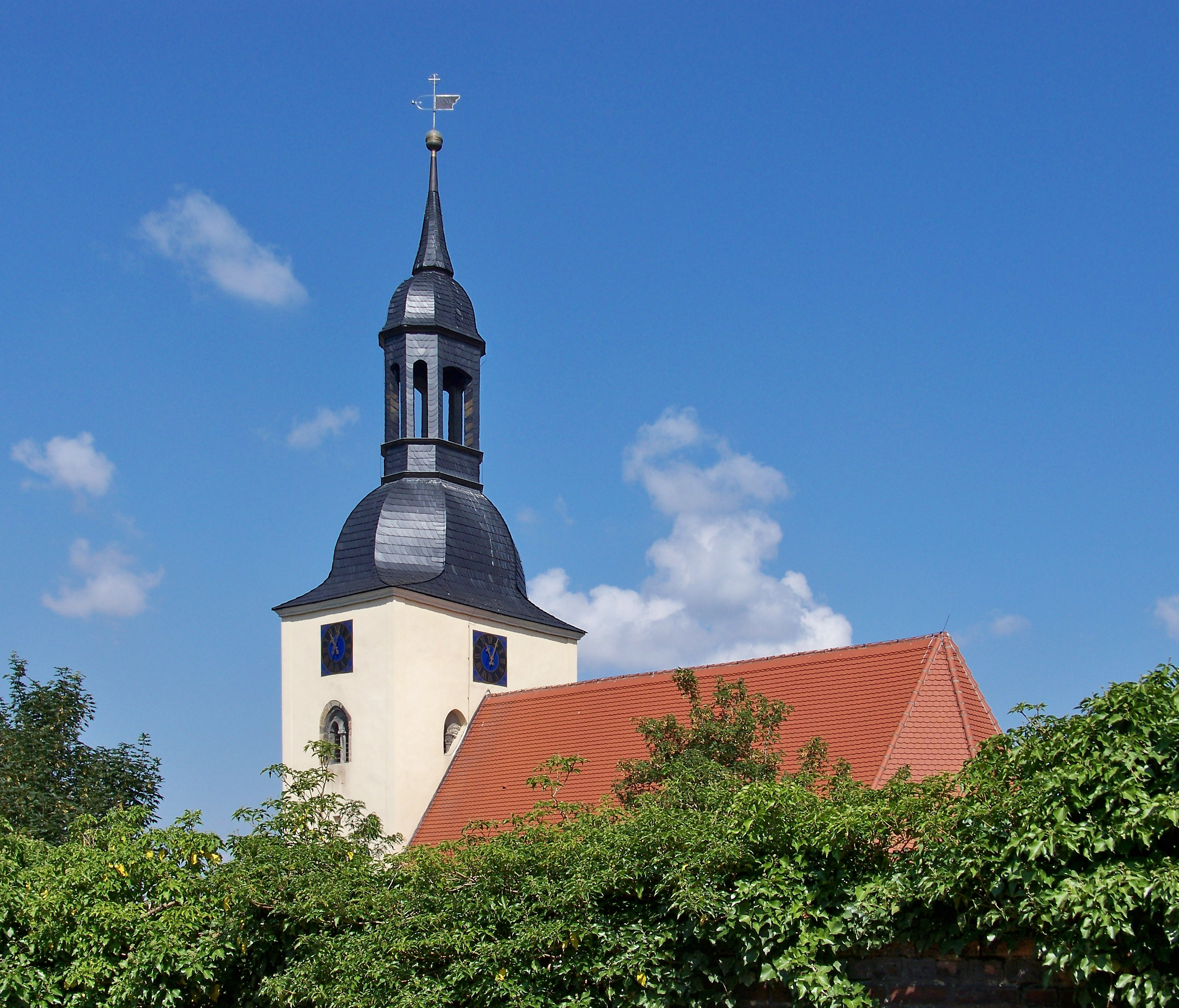 Kirche in Korbetha (Schkopau)